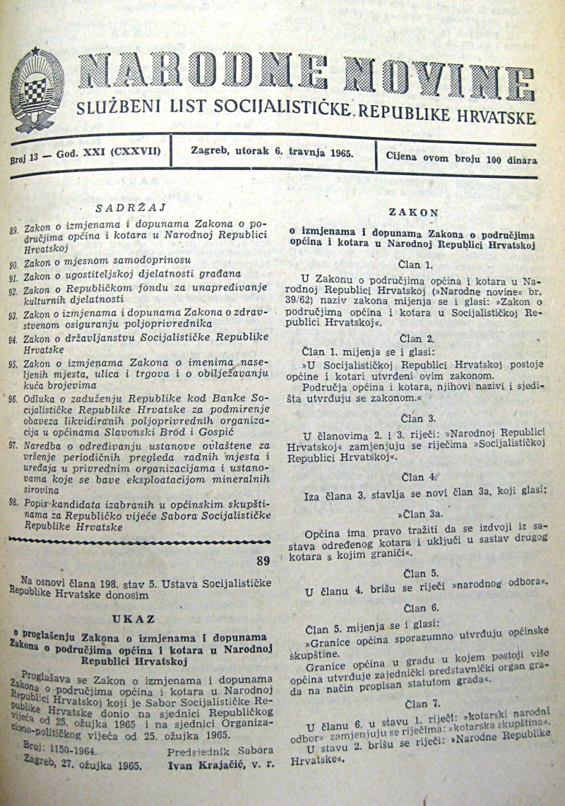 "Narodne novine" broj 13 od 6. travnja 1965. godine